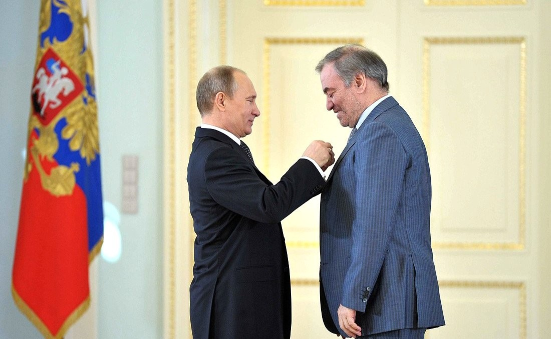 Звание Героя Труда присвоено дирижёру, художественному руководителю – директор Мариинского театра Валерию Гергиеву.